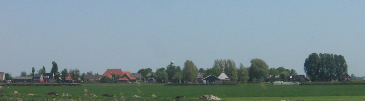 Oosterzee-Buren, gezien vanaf A6